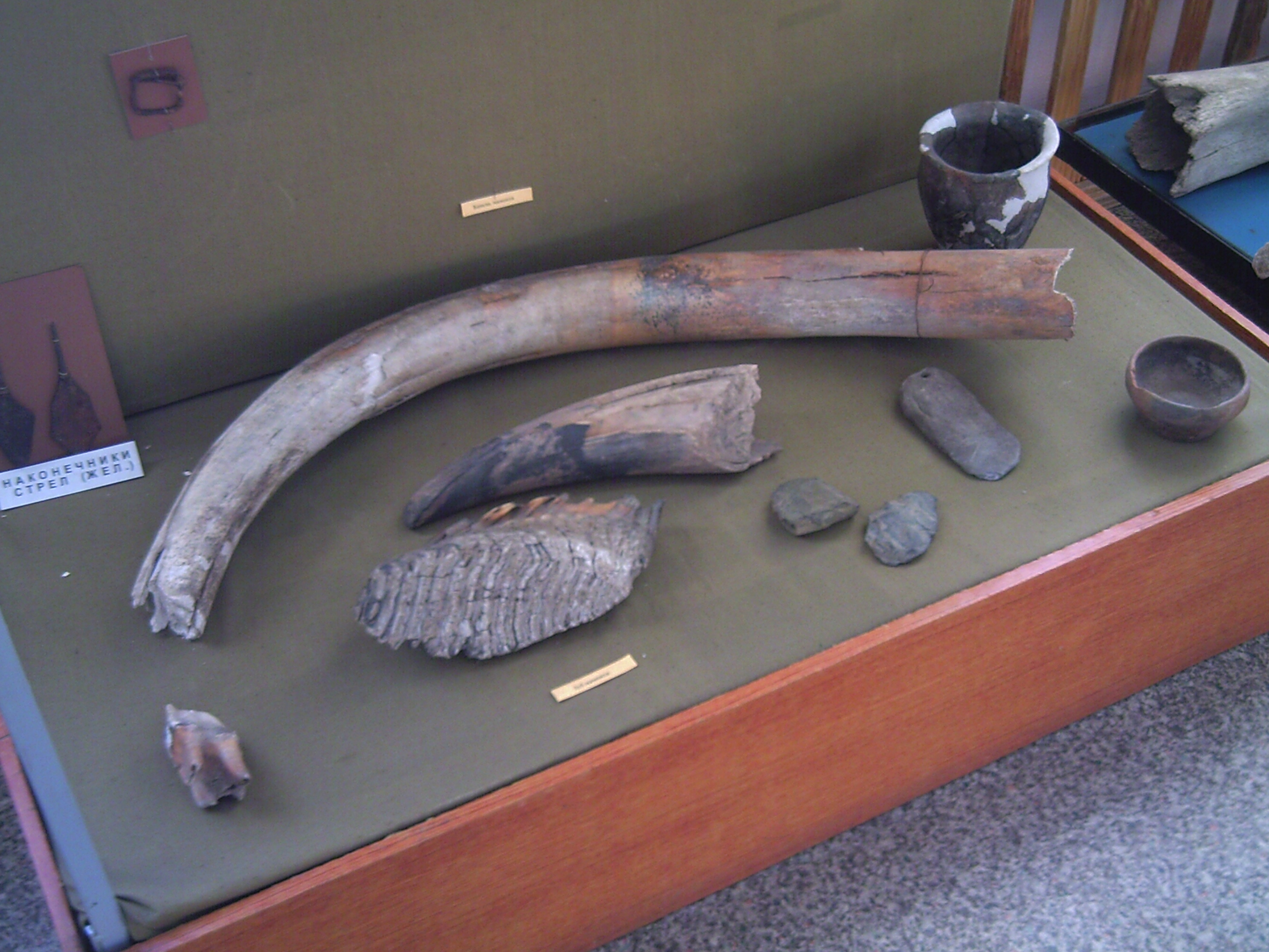 зал археологии